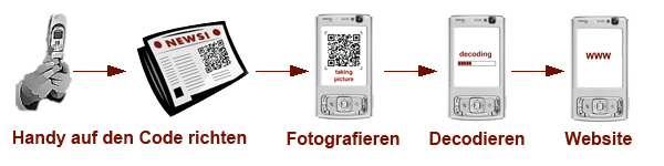 Prozess des Taggens